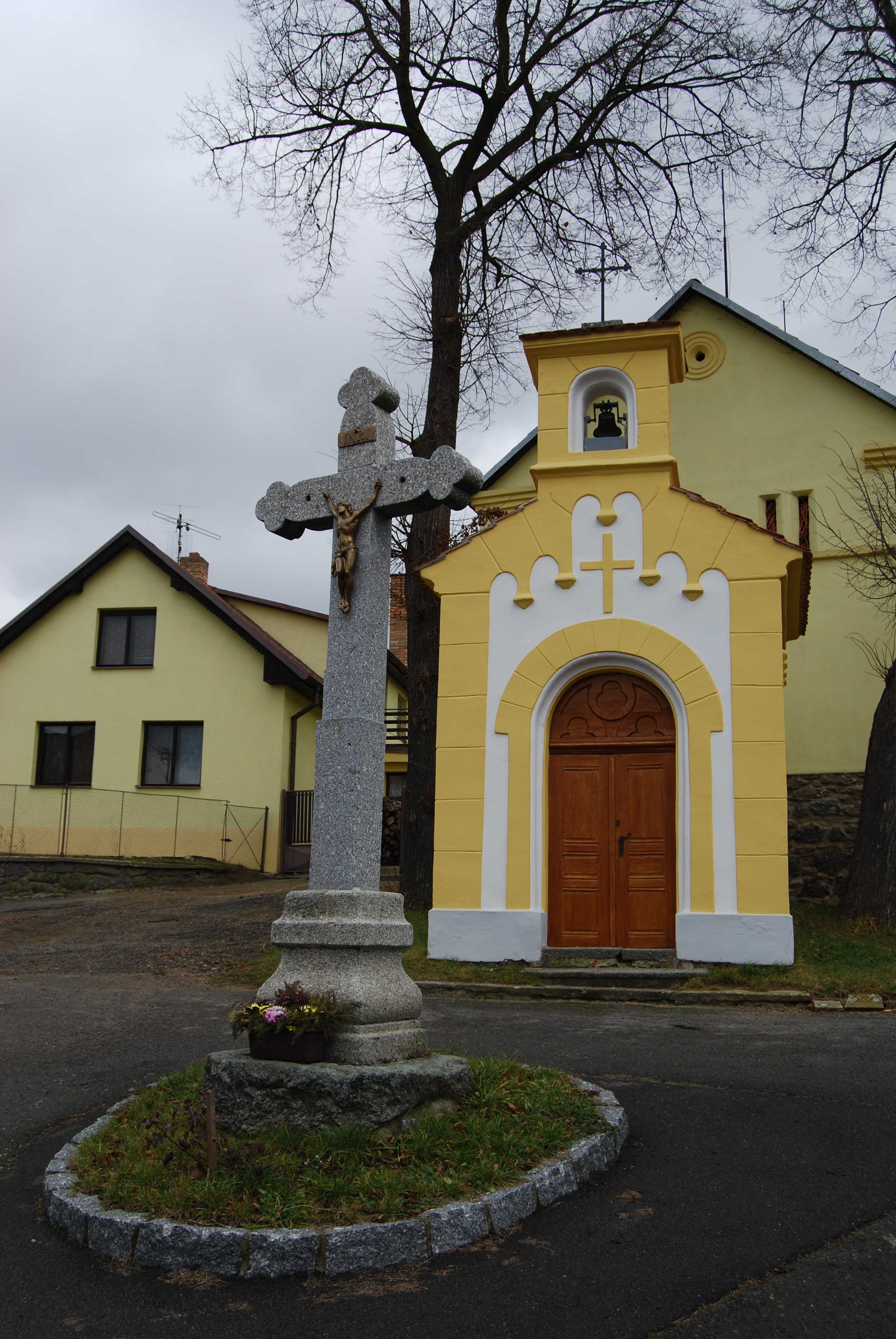 Kaple sv. Jana Nepomuckého z let 1857-1858 na návsi. Kříž před kaplí je z roku 2008 a je umístěný na místě původního z roku 1857. Vesec (Kovářov). Okres Písek. Česká republika.